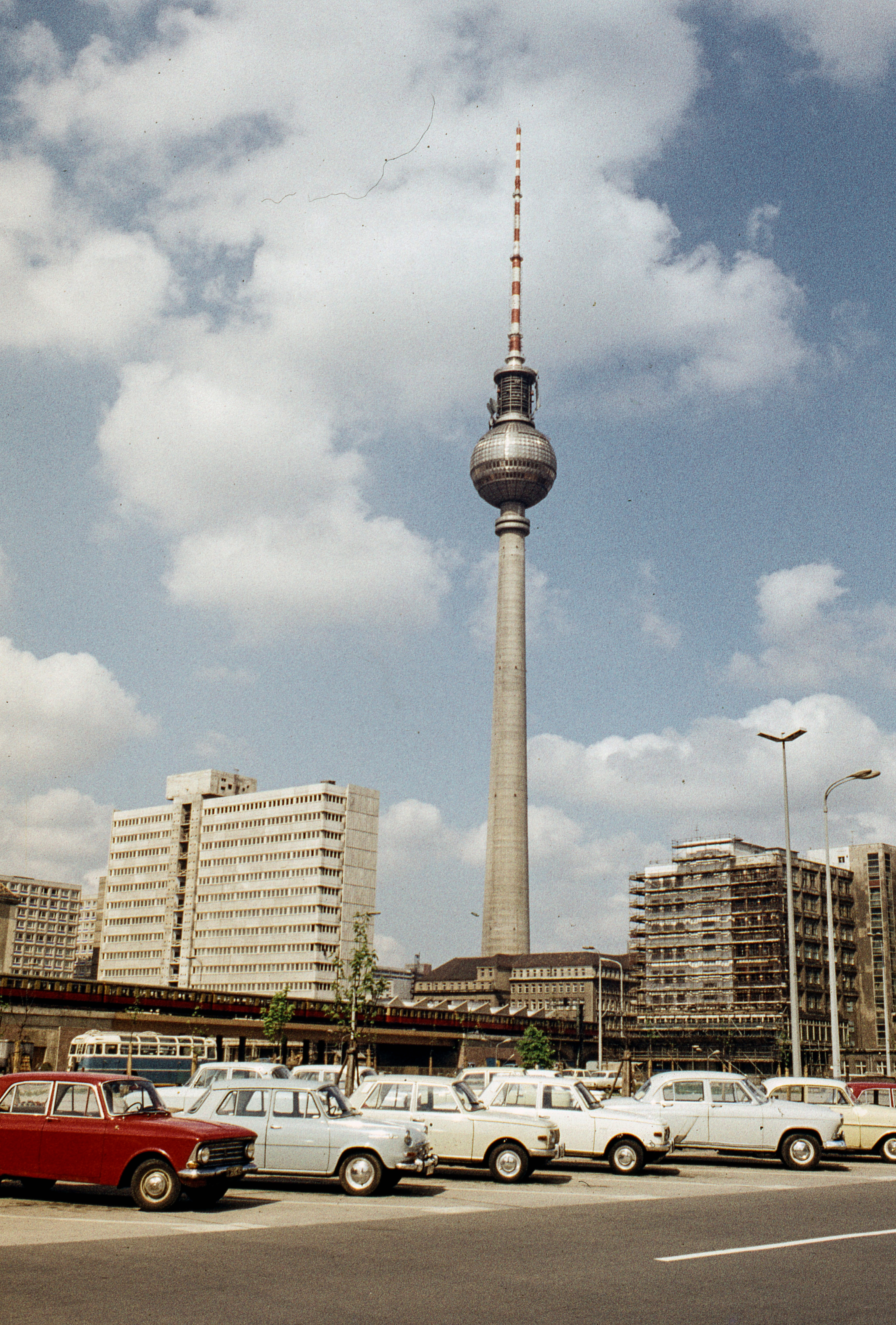 Kelet-Berlin, TV torony az Alexanderstrasse felől nézve. Location: Germany, Berlin Tags: colorful, automobile, TV tower, GDR, East-Berlin, Wartburg-brand, Moscow-brand, Skoda-brand, GAZ-brand, M21 Wolga, Czechoslovak brand, Soviet brand, Gerrman brand Title: Kelet-Berlin, TV torony az Alexanderstrasse felől nézve.